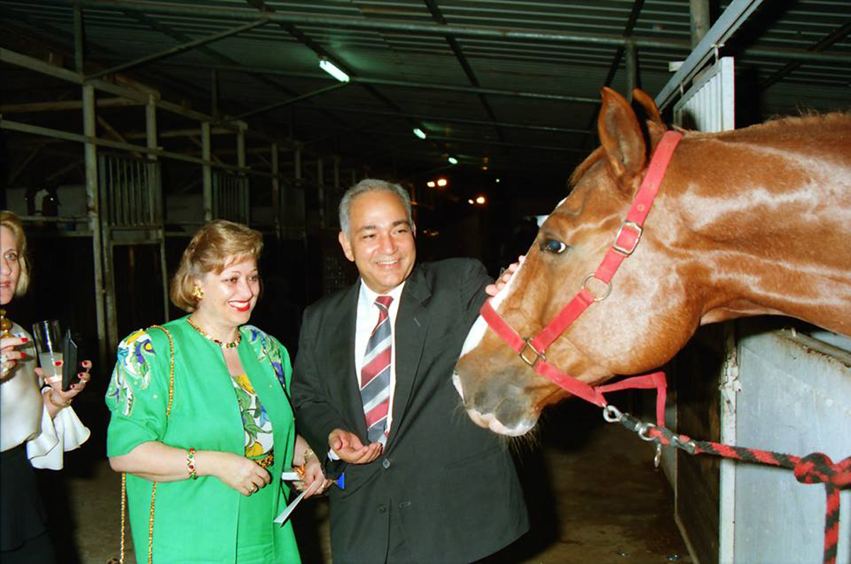 מוחמד בסיוני ואישתו